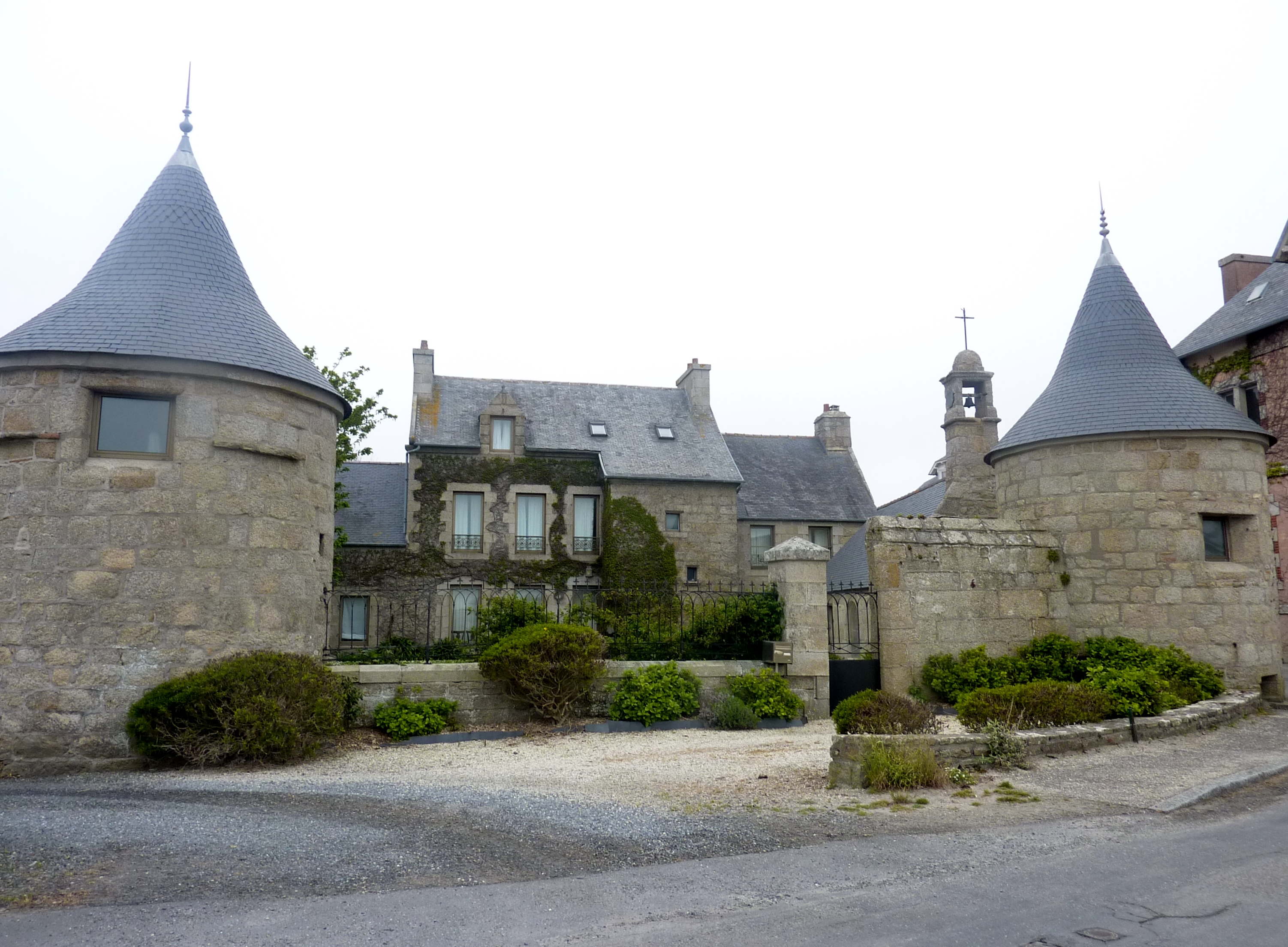 Brignogan : le manoir du Scluz, construit au début du XVIIe siècle (état actuel, après restauration)